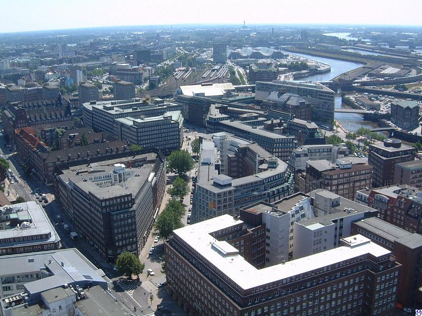 Hamburger Kontorhausviertel von St.Petri